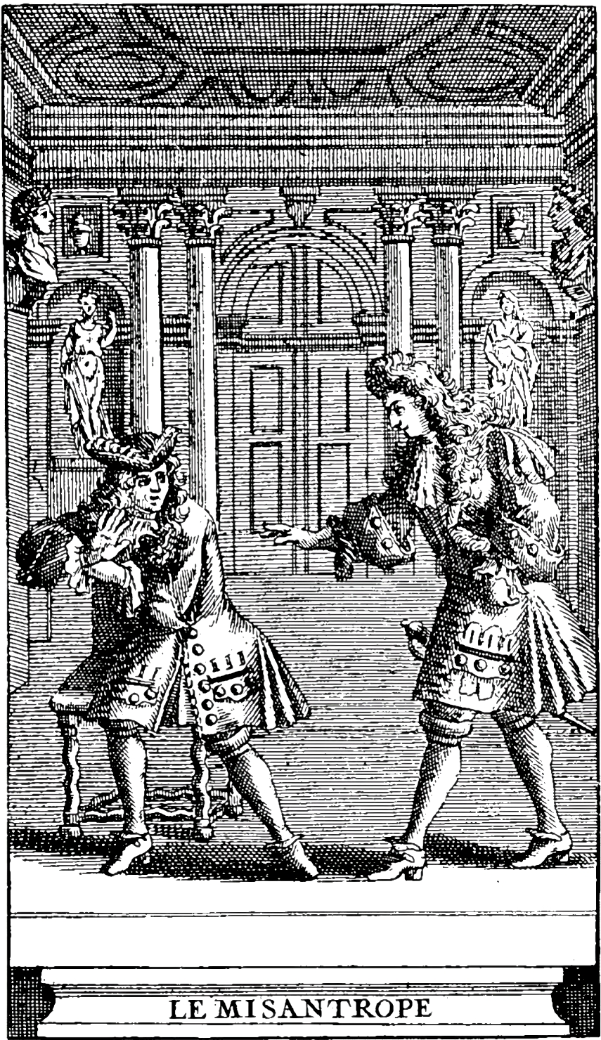 Front page of Le Misanthrope (1666) by Molière (1622-1673)